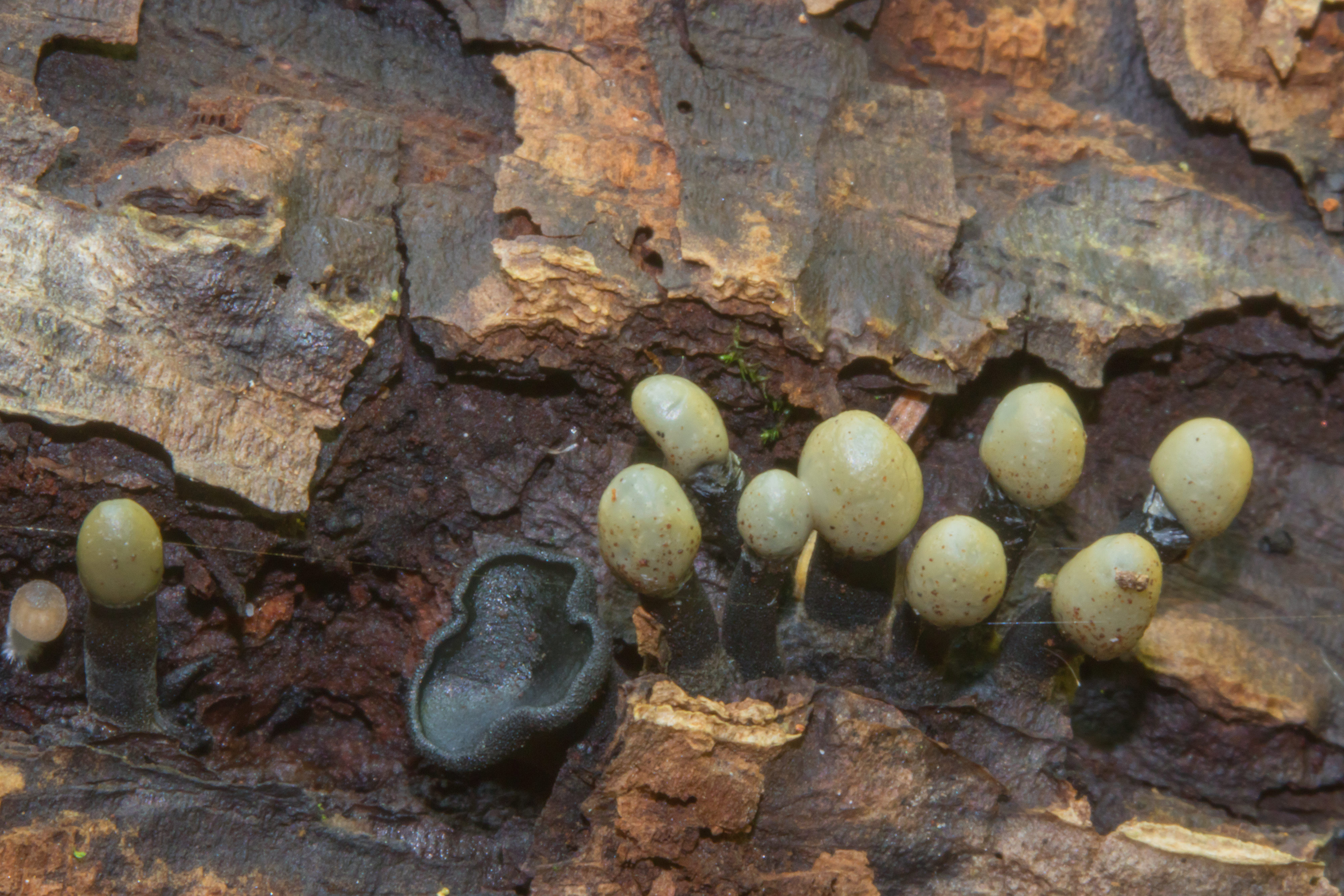 Lipnik lepki - anamorfy, czyli stadia niedoskonałe (konidialne), z czarnymi trzonkami z szarymi główkami oraz stadium generatywne – teleomorfy - cały czarny talerzyk.